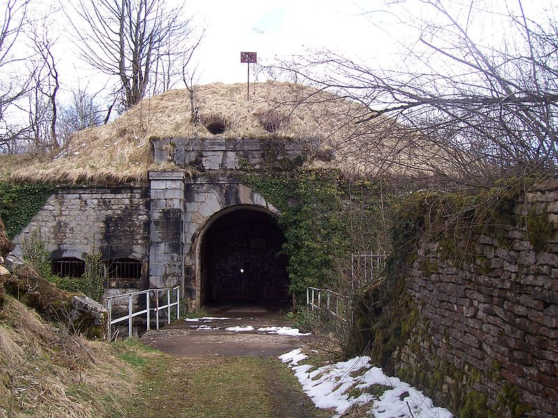 Fort de Chailluz